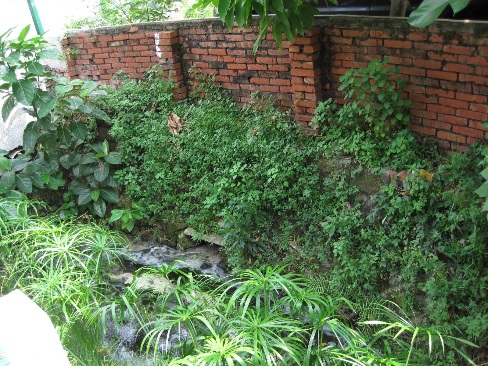 中文（台灣）: 臺南市福安坑溪，已成溝渠。